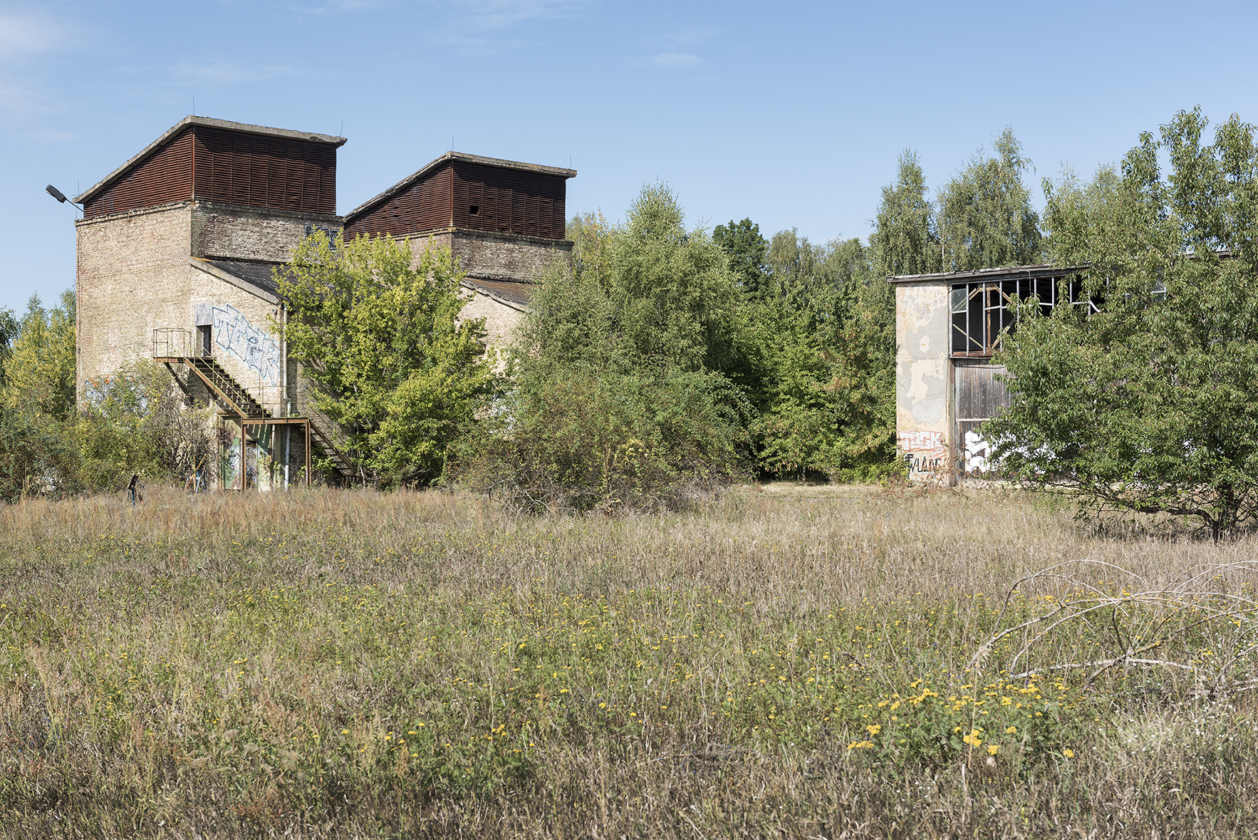 Flugplatz Rangsdorf, Ansicht des Motorenprüfstandes gegen Norden.